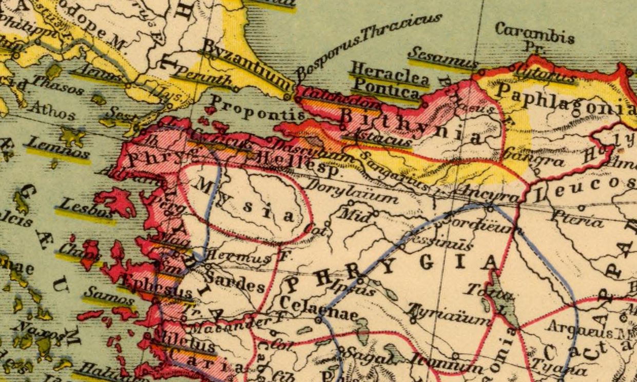 Imperia Persarum et Macedonum. (with) Regna Diadochorum medio IIIo. a. Chr. saeculo. (with) Regna Graecorum IIo a. Chr. saeculo. Auctore Henrico Kiepert Berolinensi. Geographische Verlagshandlung Dietrich Reimer (Ernst Vohsen) Berlin, Wilhemlstr. 29. (1903)